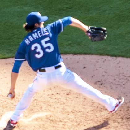 Cole Hamels